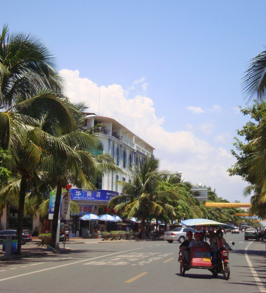 Boao, Hainan, China